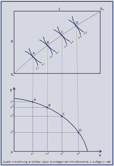 Herleitung der Transformationskurve / Edgeworth-Box